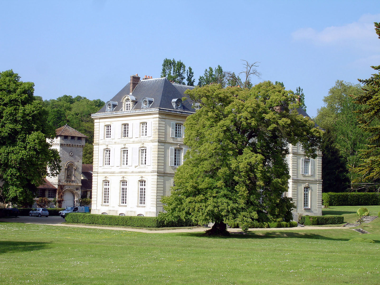 Le hameau d'Hérivaux, écart de Luzarches, Val-d'Oise, France. Le domaine abrite les ruines de l'abbaye du XIIe siècle, et un bâtiment conventuel du XVIIIe siècle, devenu une résidence de standing.